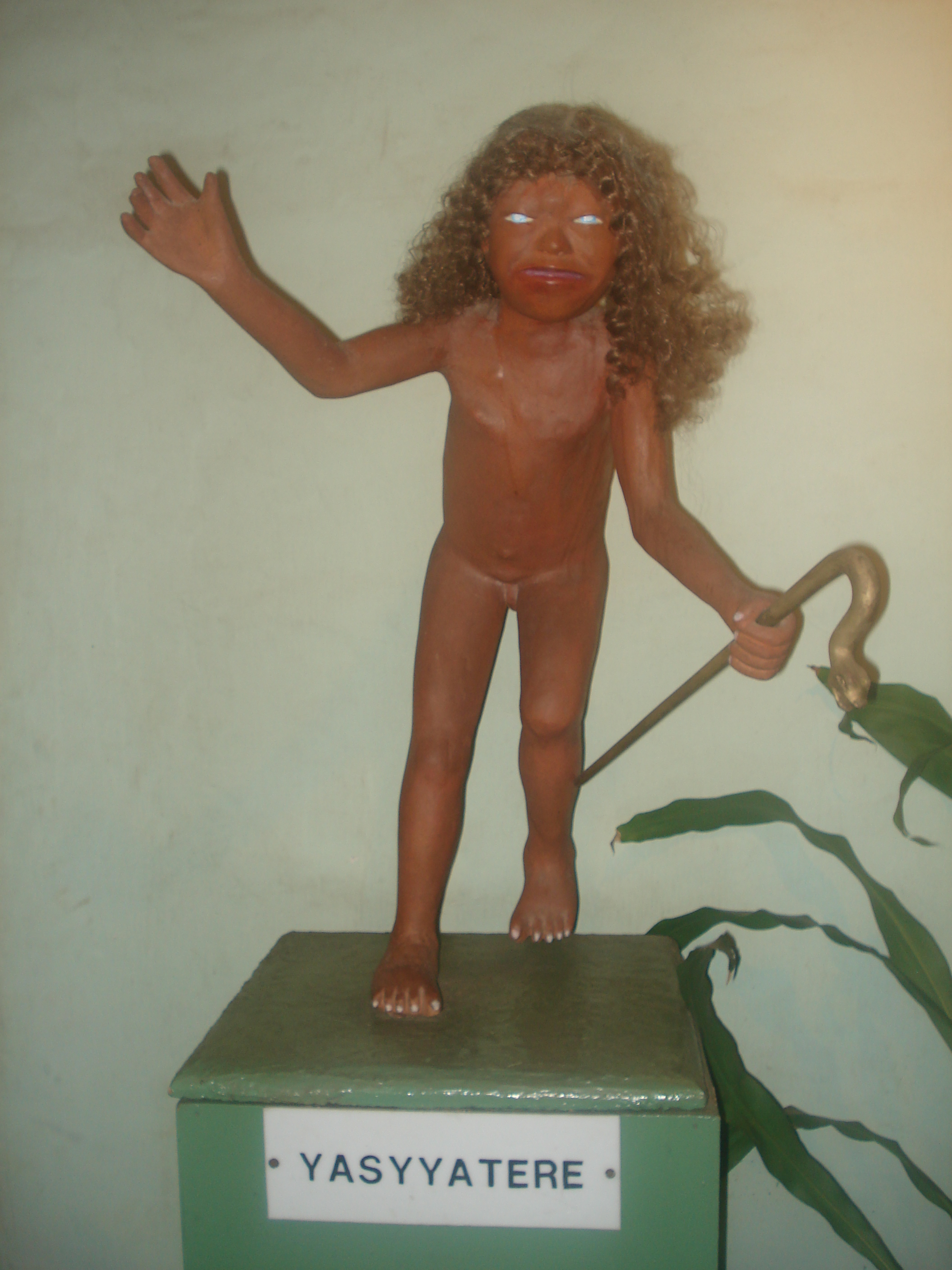 Yasy Yatere. Mito paraguayo